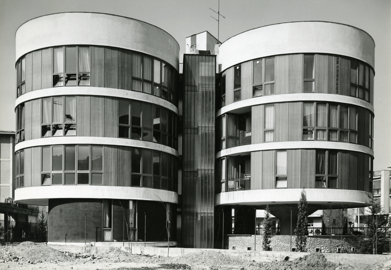 Servizio fotografico : Milano, 1970 / Paolo Monti. - Stampe: 10 : Positivo b/n, gelatina bromuro d'argento/ carta, 24x30. - ((Al verso delle stampe manoscritti (in forma abbreviata) e impressi a inchiostro i numeri inventariali: 44369, 44371, 44374, 44375, [44]383, [44]387, [44]388, [44]389, [44]391, [44]392, timbro a inchiostro con copyright (Foto Studio 22 - Corso Sempione - Milano). - Sul coperchio della scatola iscrizione didascalica manoscritta a pennarello nero: "Archit. Moderna". - Fonte: Rubrica di Paolo Monti: Archivio fino 1-4-1961/ 31-3-1963 (1961-1963), presso Archivio Paolo Monti